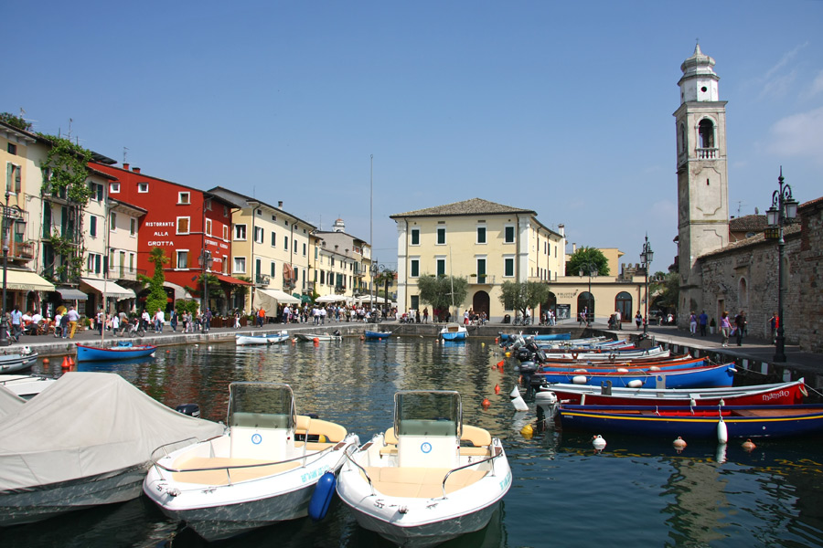 Veduta del porticciolo di Lazise (VR)